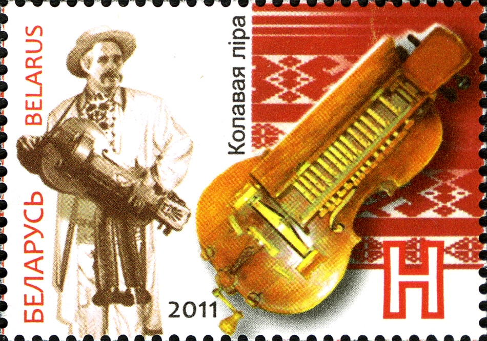 Совместный выпуск Беларуси и Азербайджана